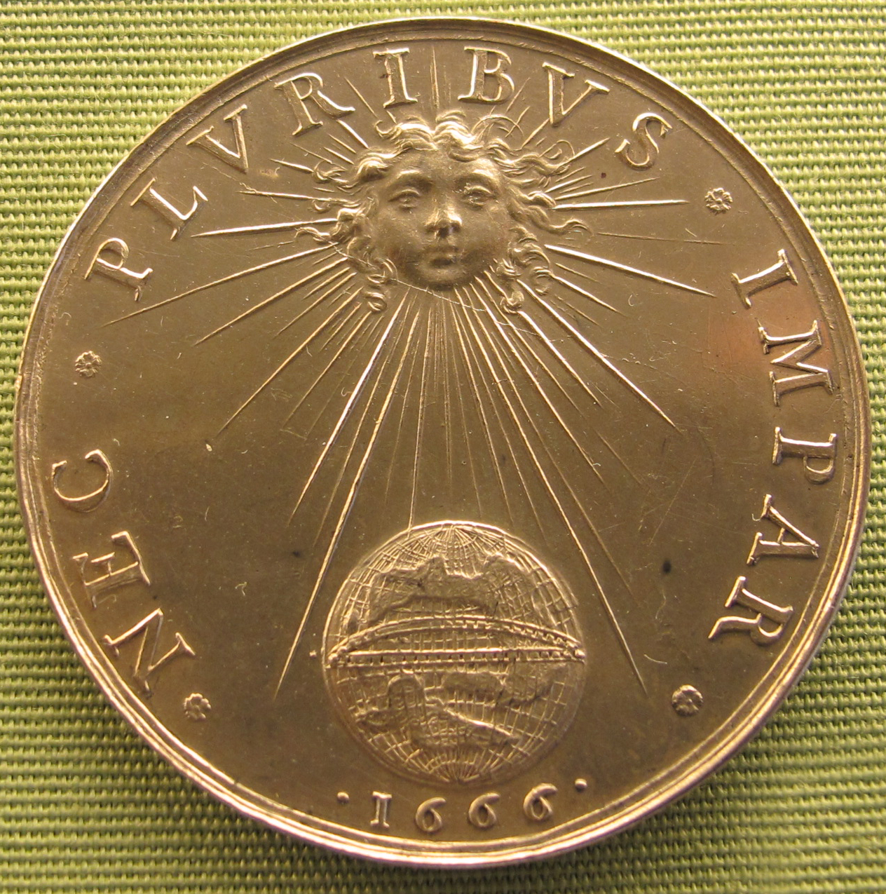 Luigi XIV, verso con motto, sole e globo, 1666